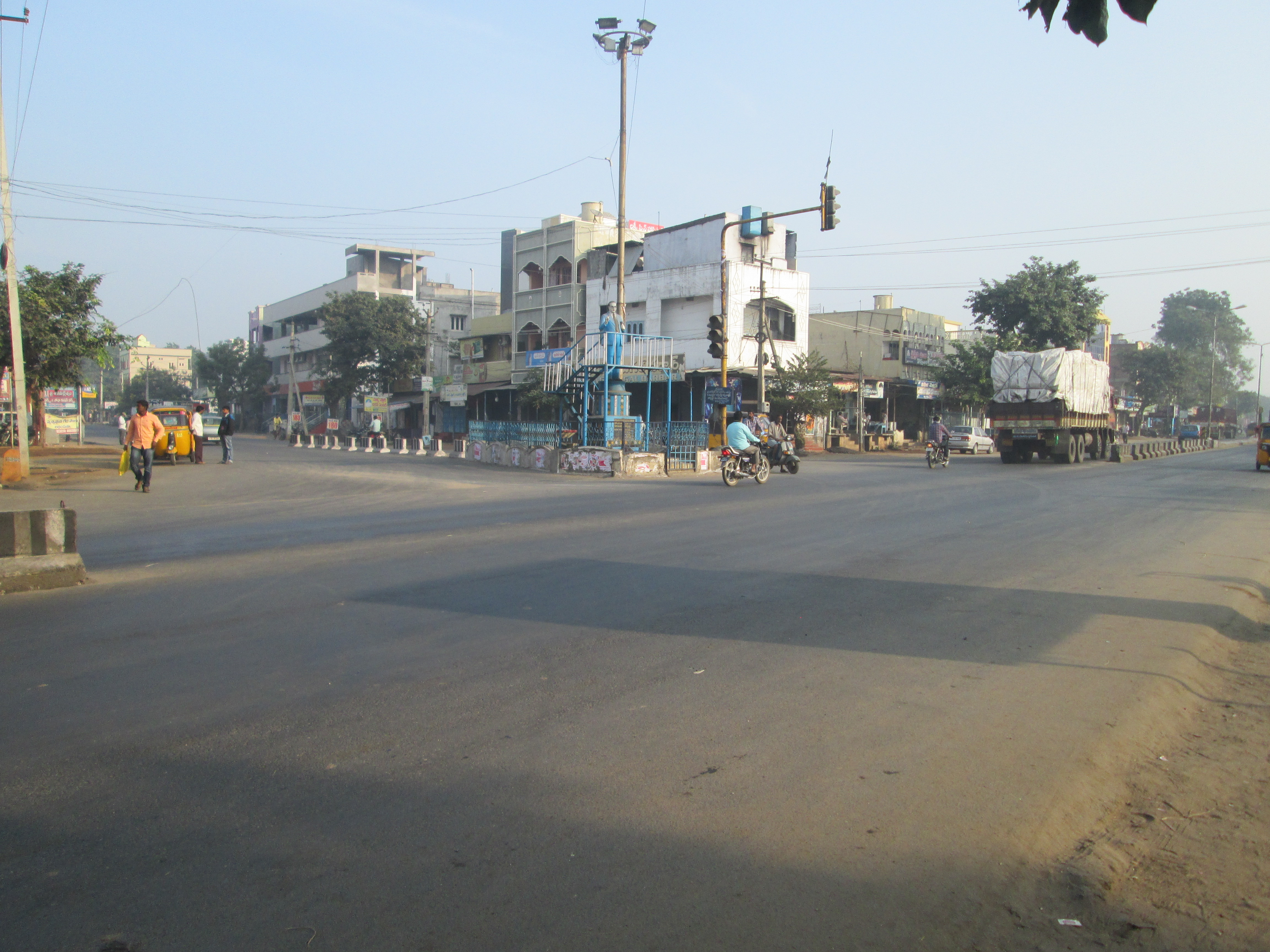 పాల్వంచ లోని అంబేద్కర్ సర్కిల్